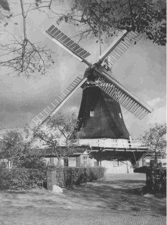 Peldemühle in Wittmund / Ostfriesland um 1955